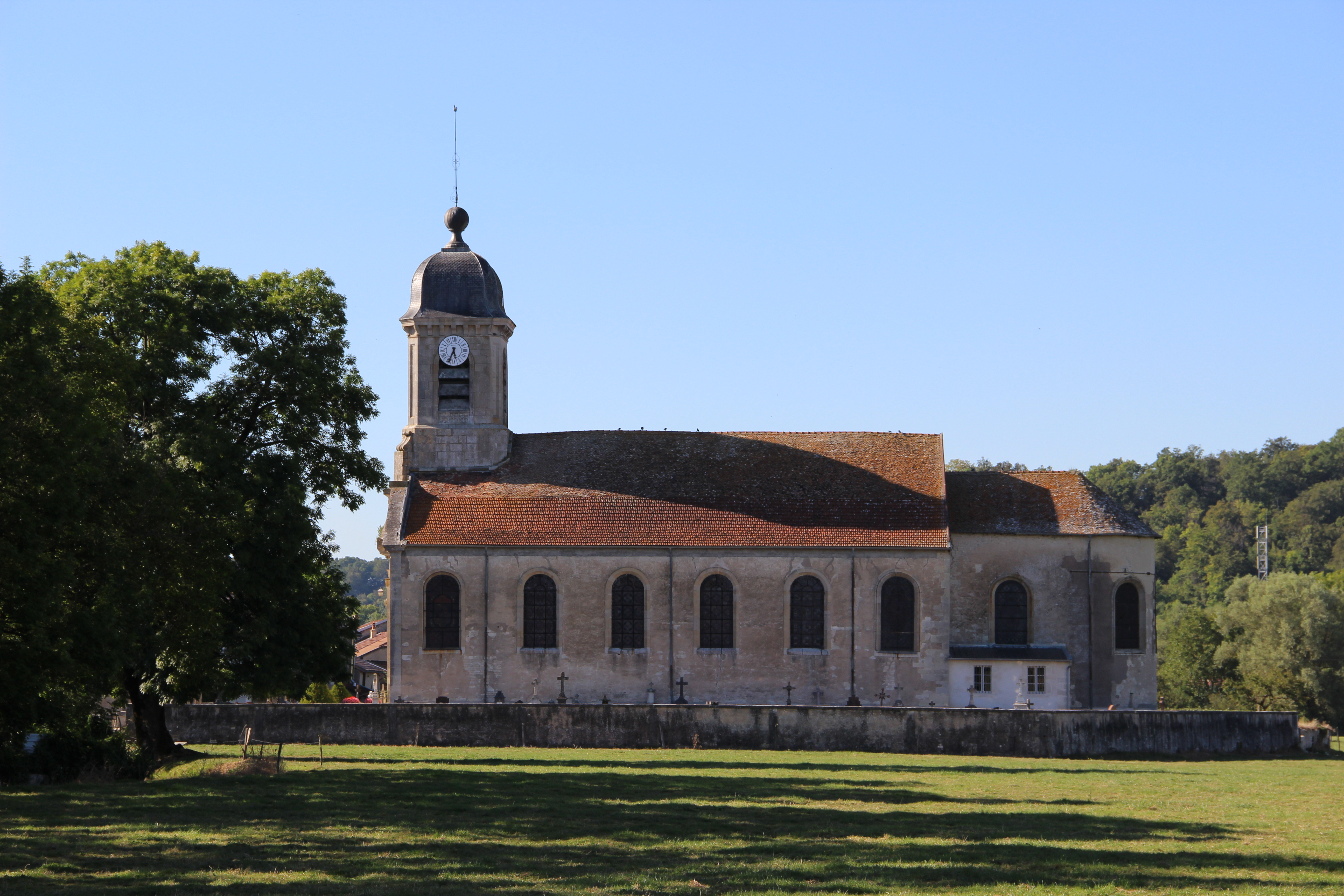 Eglise de Demange